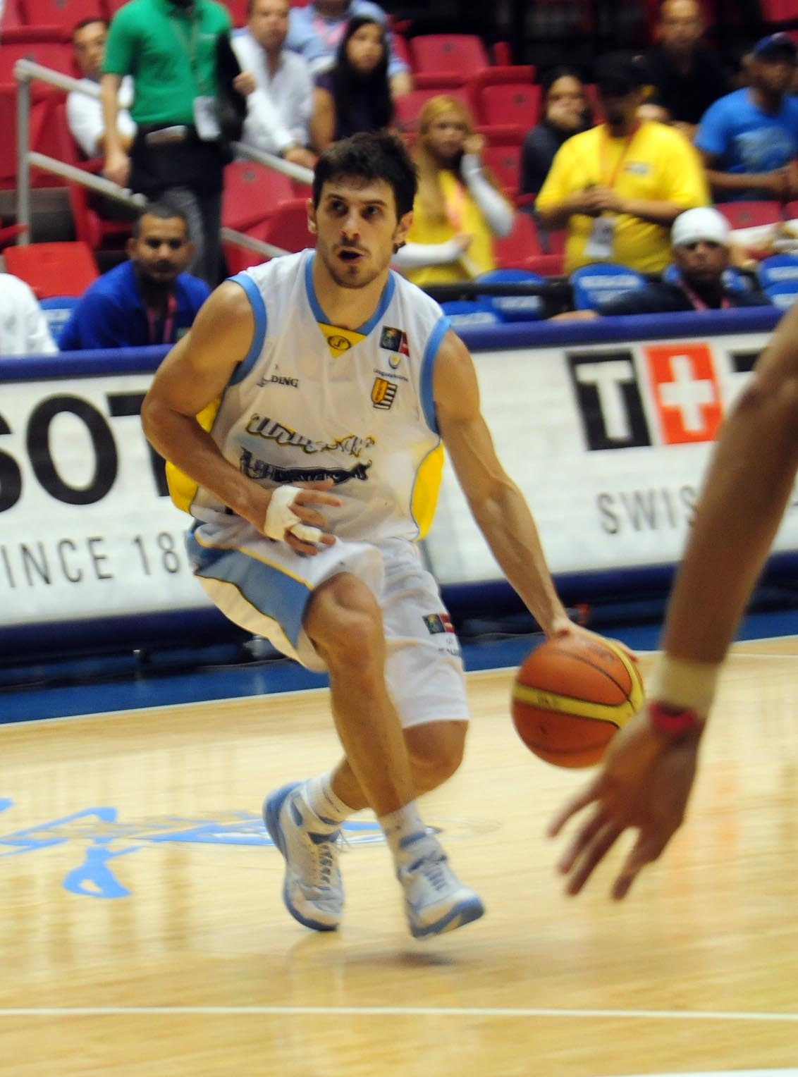 Leandro García Morales, Jugando para la Seleccion Nacional de Uruguay